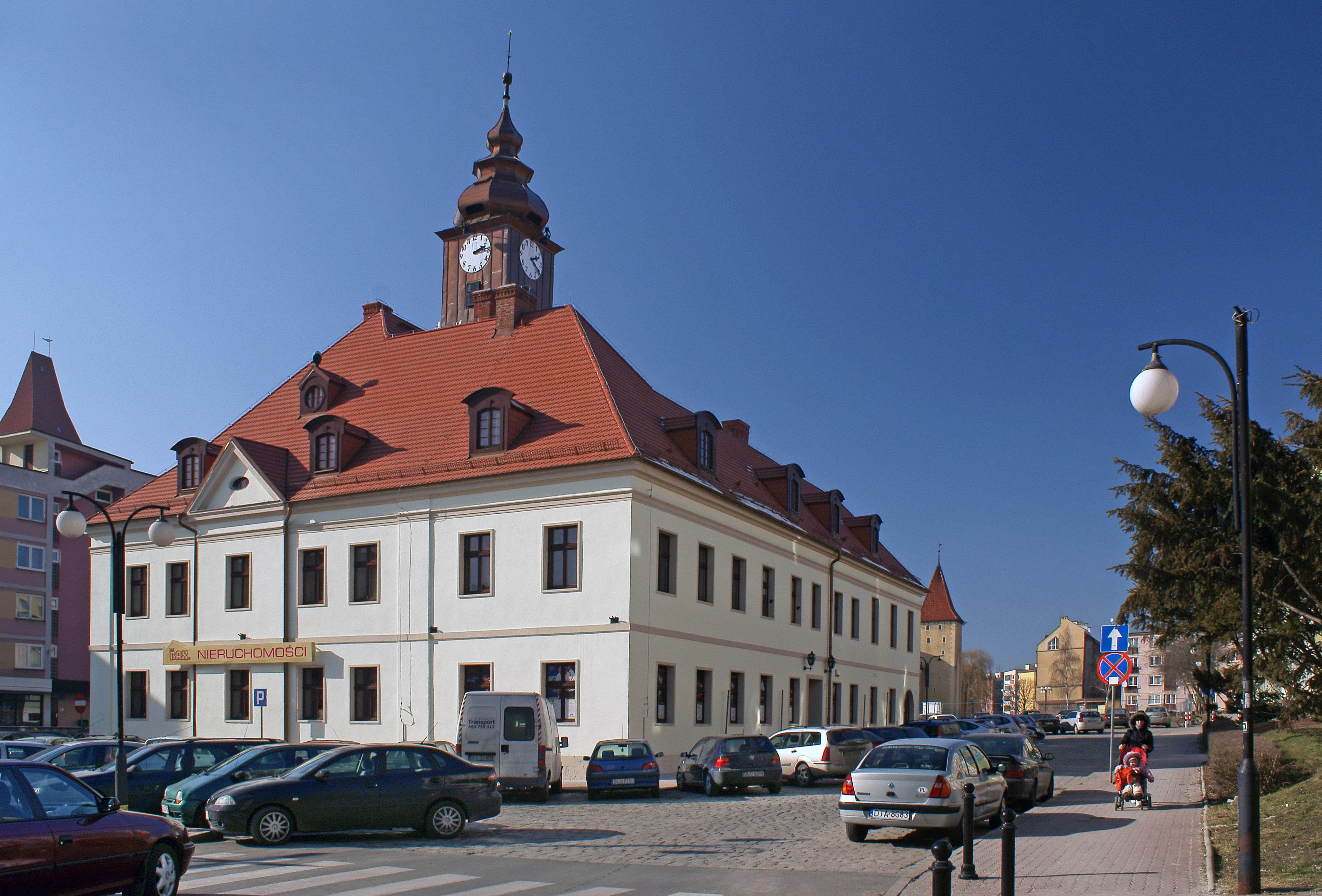 Lubin, Rynek - Ratusz (zabytek nr A/3035/608/L)